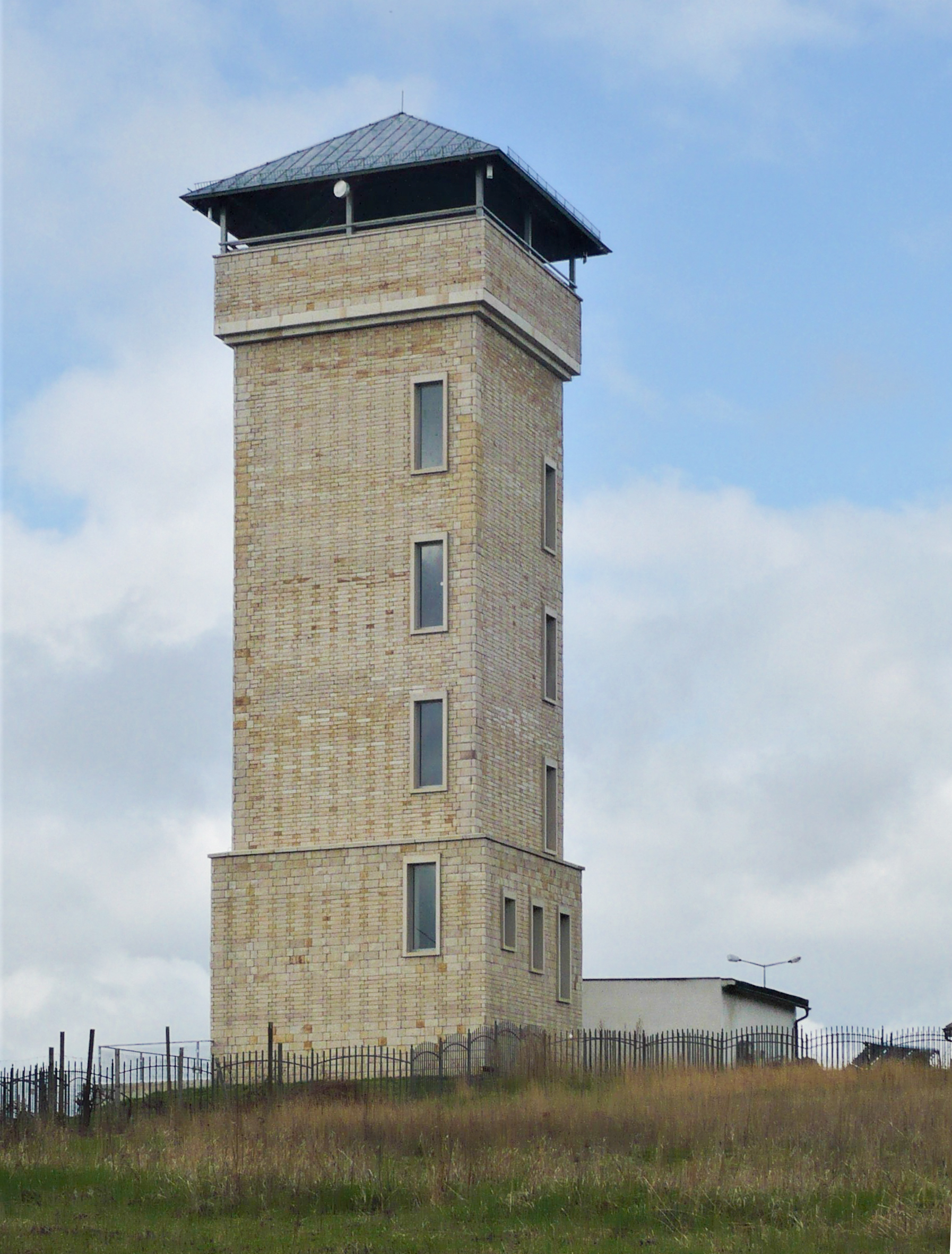 Suszyna - Wieża widokowa Suszynka, 2014